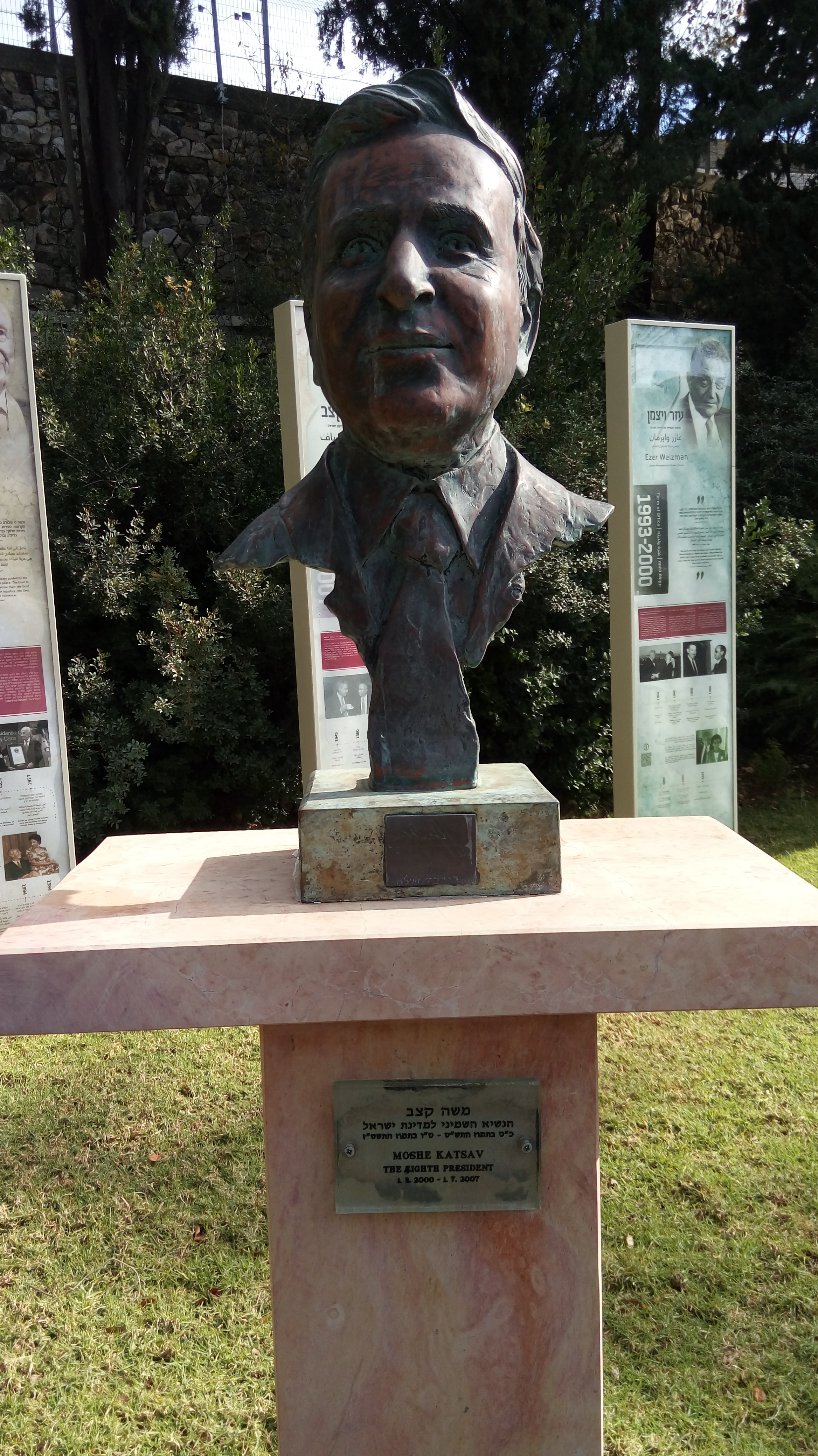 פסלו של משה קצב במשכן הנשיא